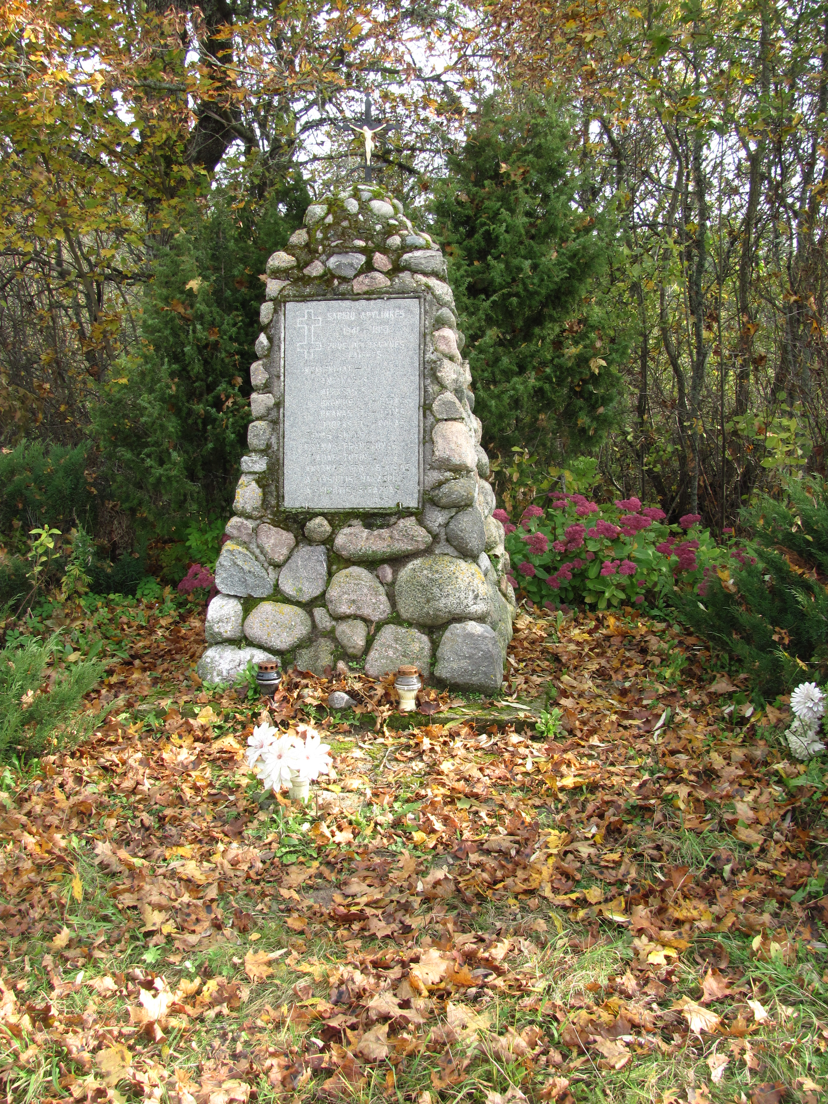 Užpalių sen., Lithuania